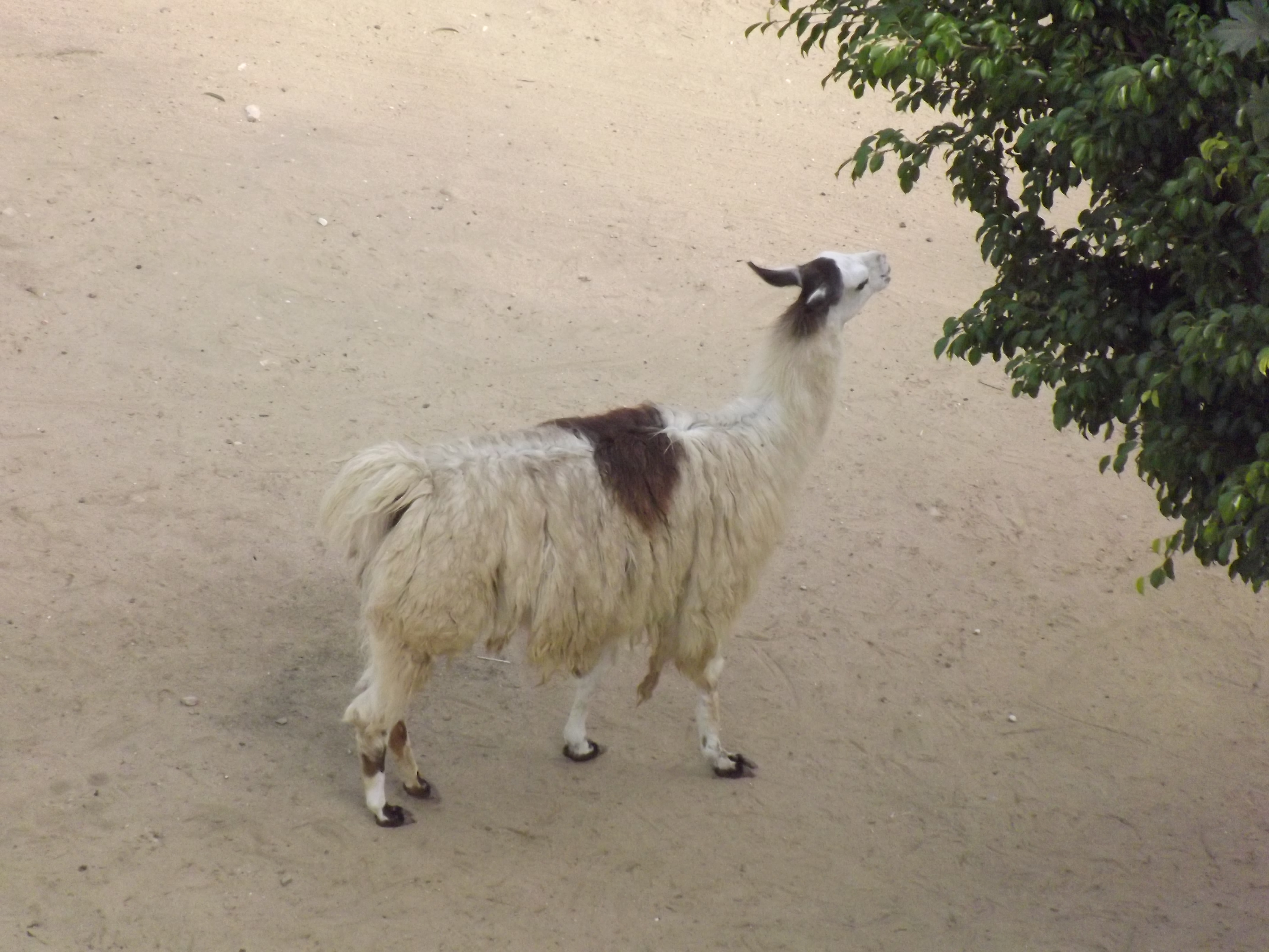 حديقة حيوان النزهة - الاسكندرية